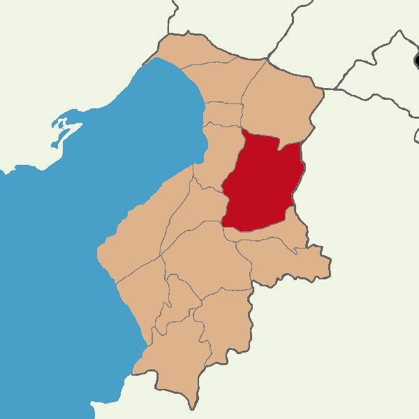 Kırıkhan ilçesinin konumu